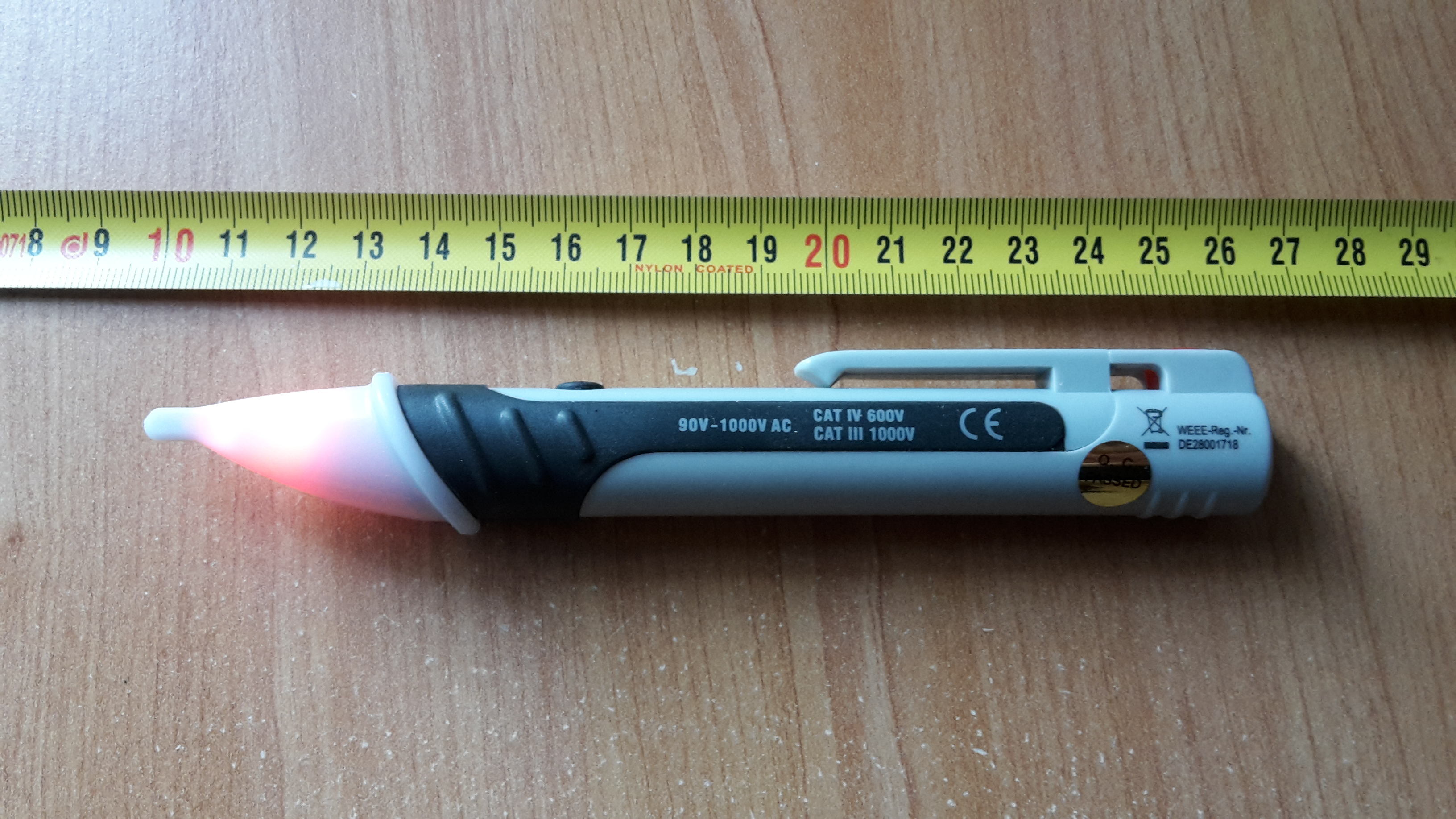 Testeur d'absence de tension - en présence d’électricité à proximité